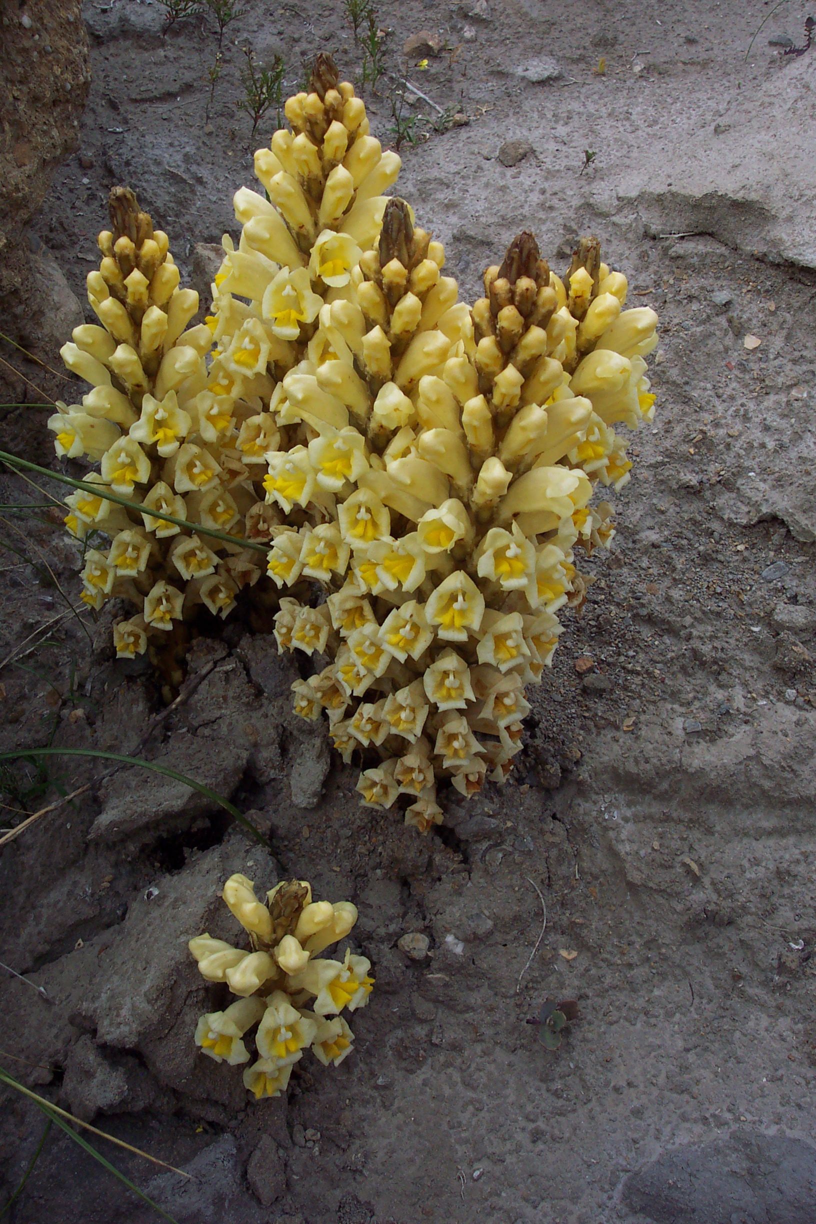 Fotografía de Cistanche phelypaea subsp. lutea, planta parásita, tomada en el subdesierto de Tabernas, provincia de Almería, España.